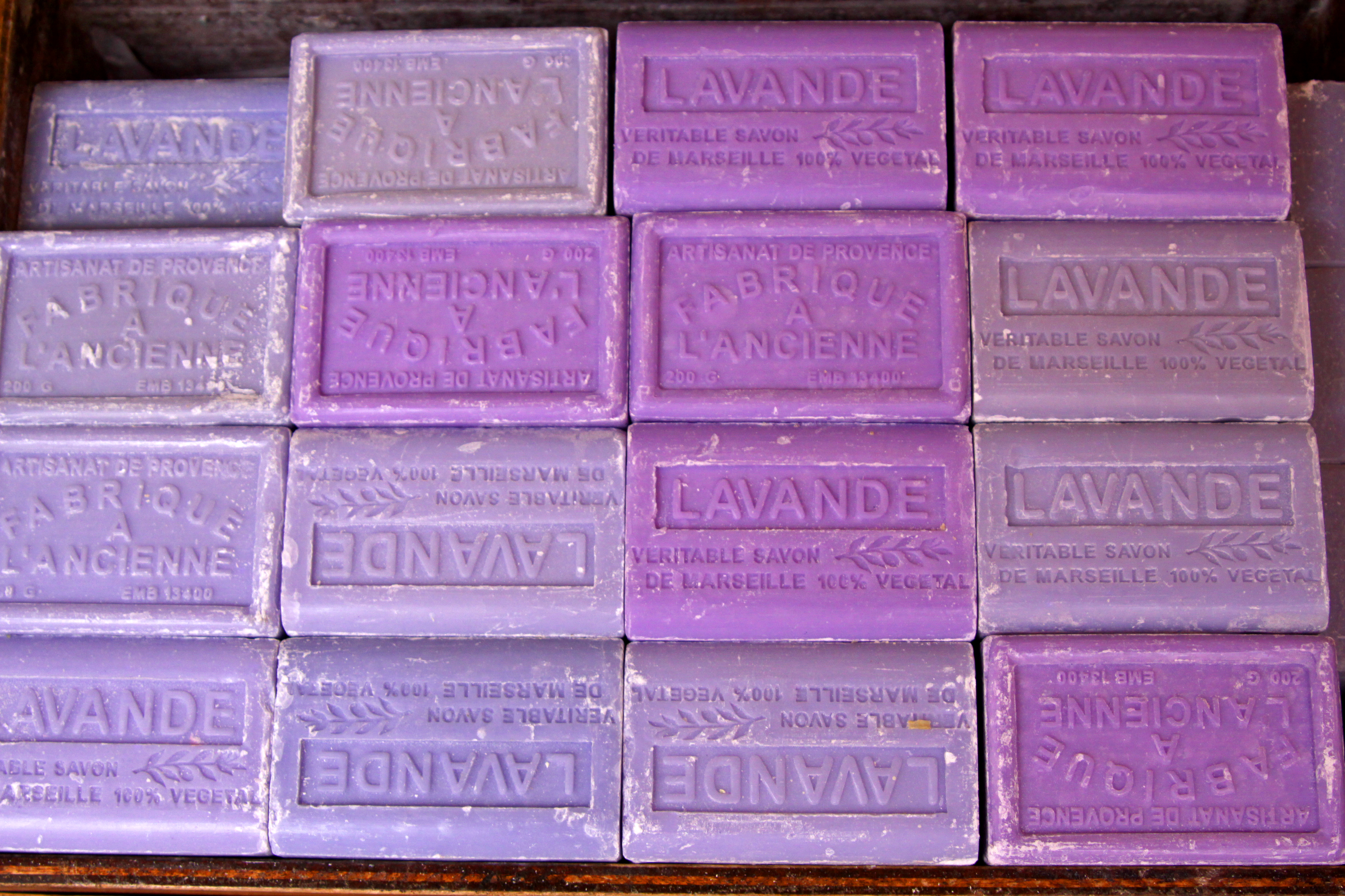 Savons à la lavande au marché d'Apt